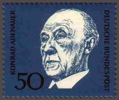 Konrad Adenauer (1876-1967), German Federal Chancellor